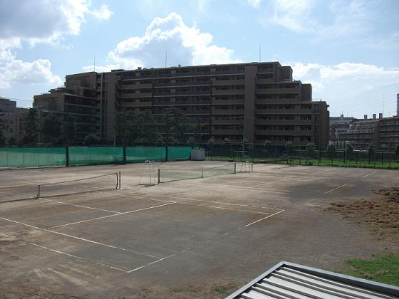 学校内：テニスコート